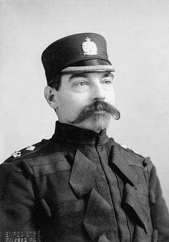 D. Legault, Chef de Police de la Cité de Montréal P.Q.